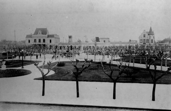 Vista de Plaza Tomás Grigera, Lomas de Zamora, Buenos Aires.